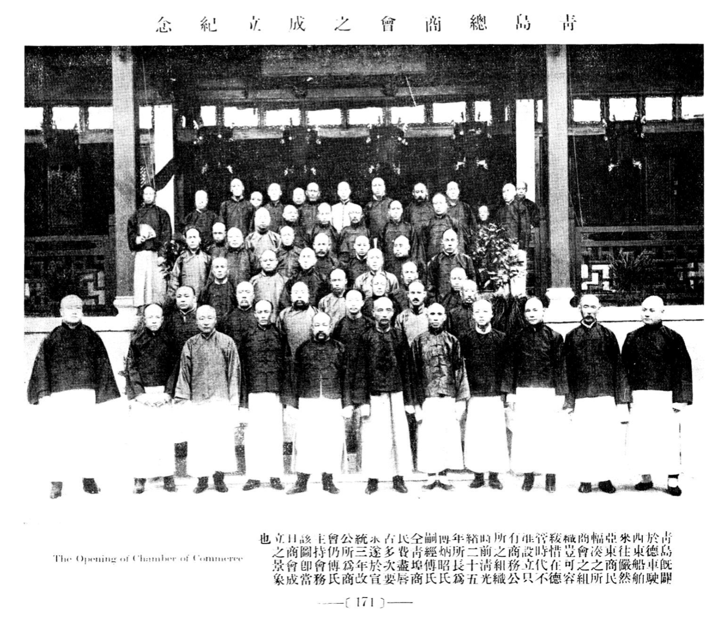 青岛总商会之成立纪念